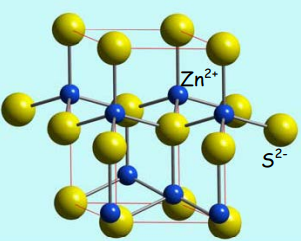 Wurtzitaren egitura Crystal structure of wurtzite